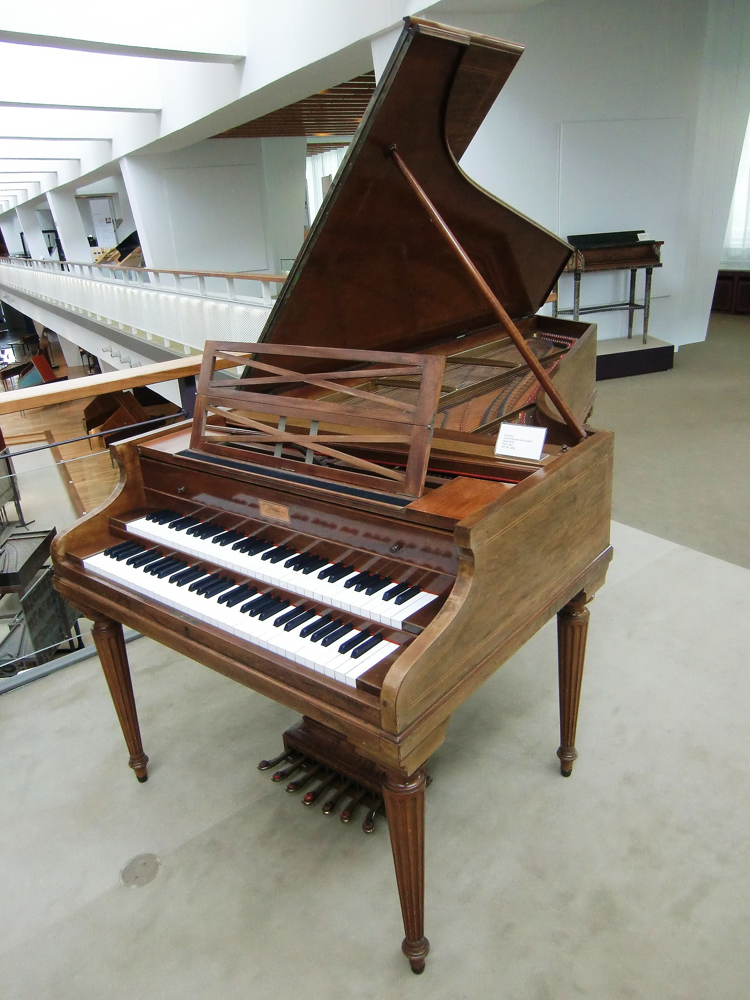 Clavecin Pleyel "Grand Modèle de Concert" (Paris 1927) - Berlin, Musikinstrumentenmuseum